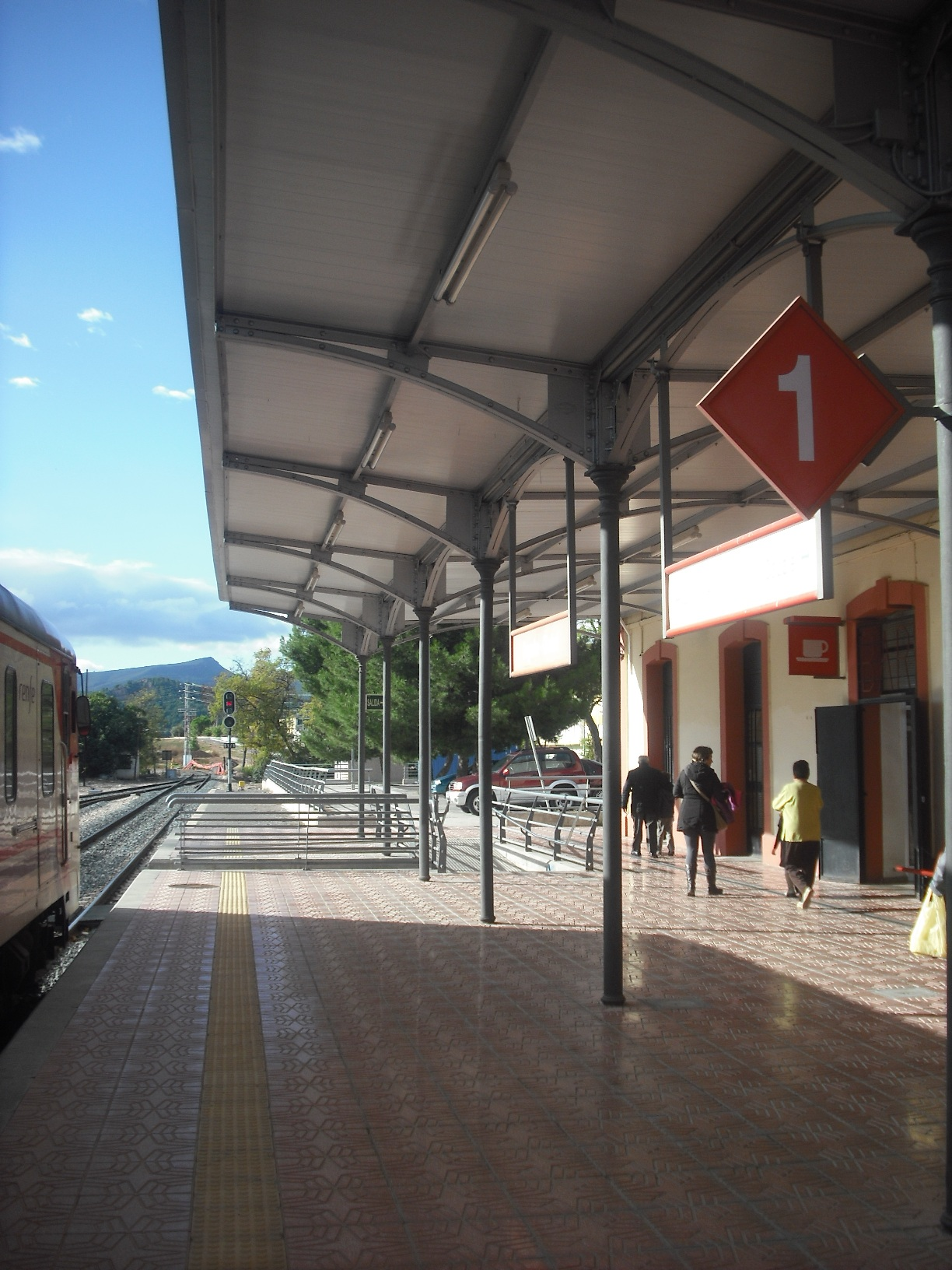 Estació Sogorb-Ciutat.